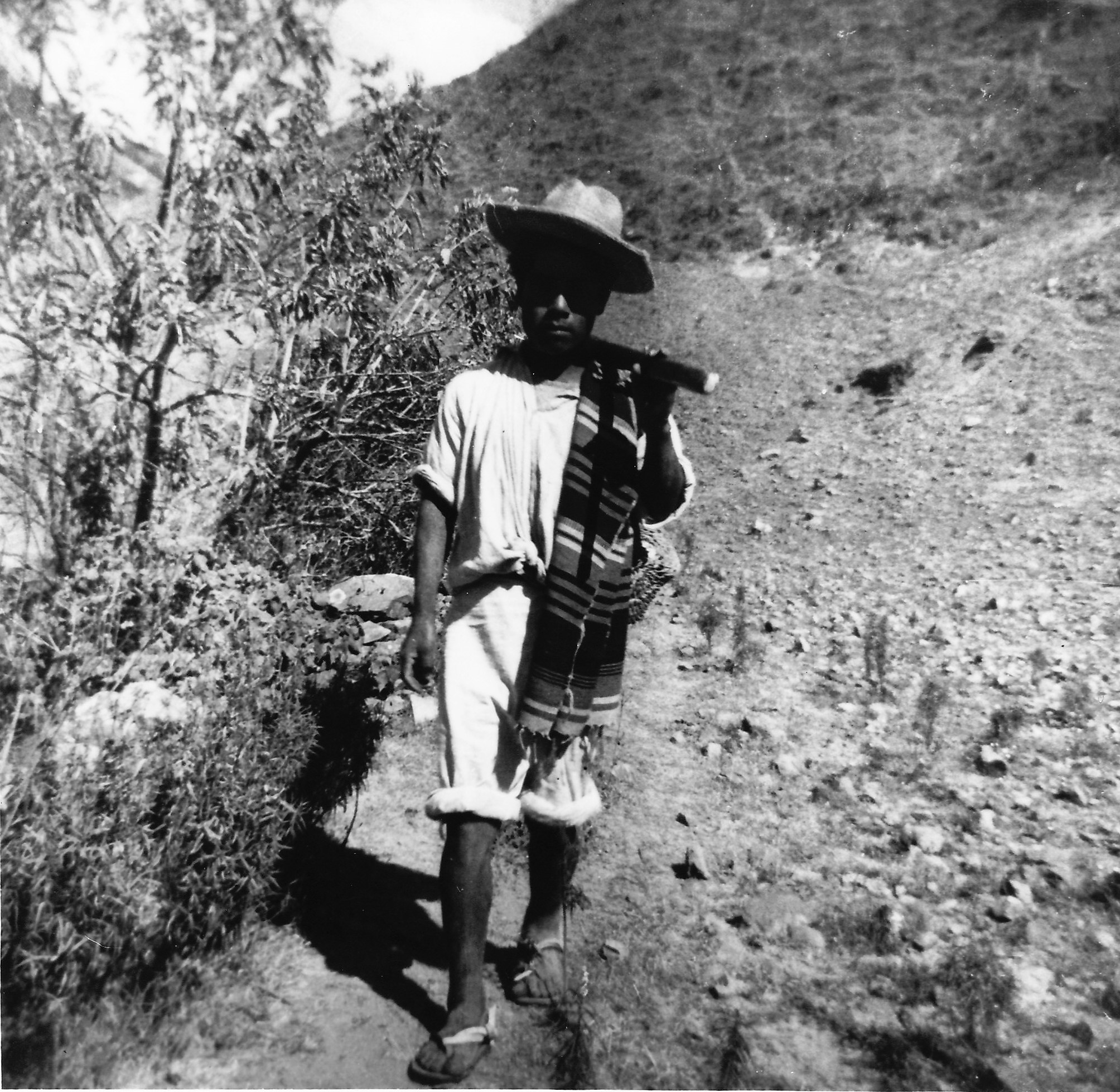 Campesino de San Juan Achiutla, Oaxaca, México, 1945